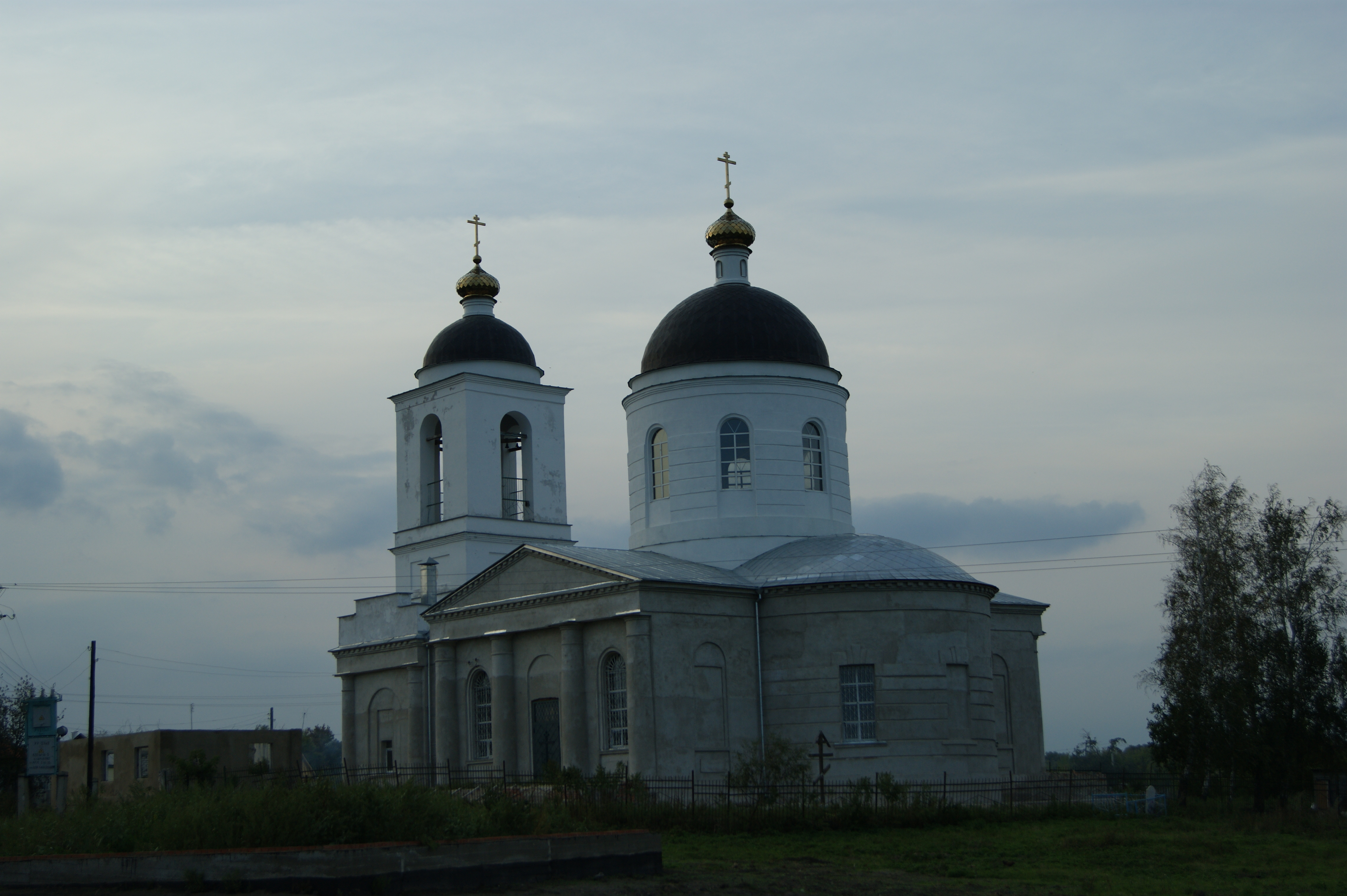 Троицкая церковь с интерьером: Шахово, Кромской район, Орловская область